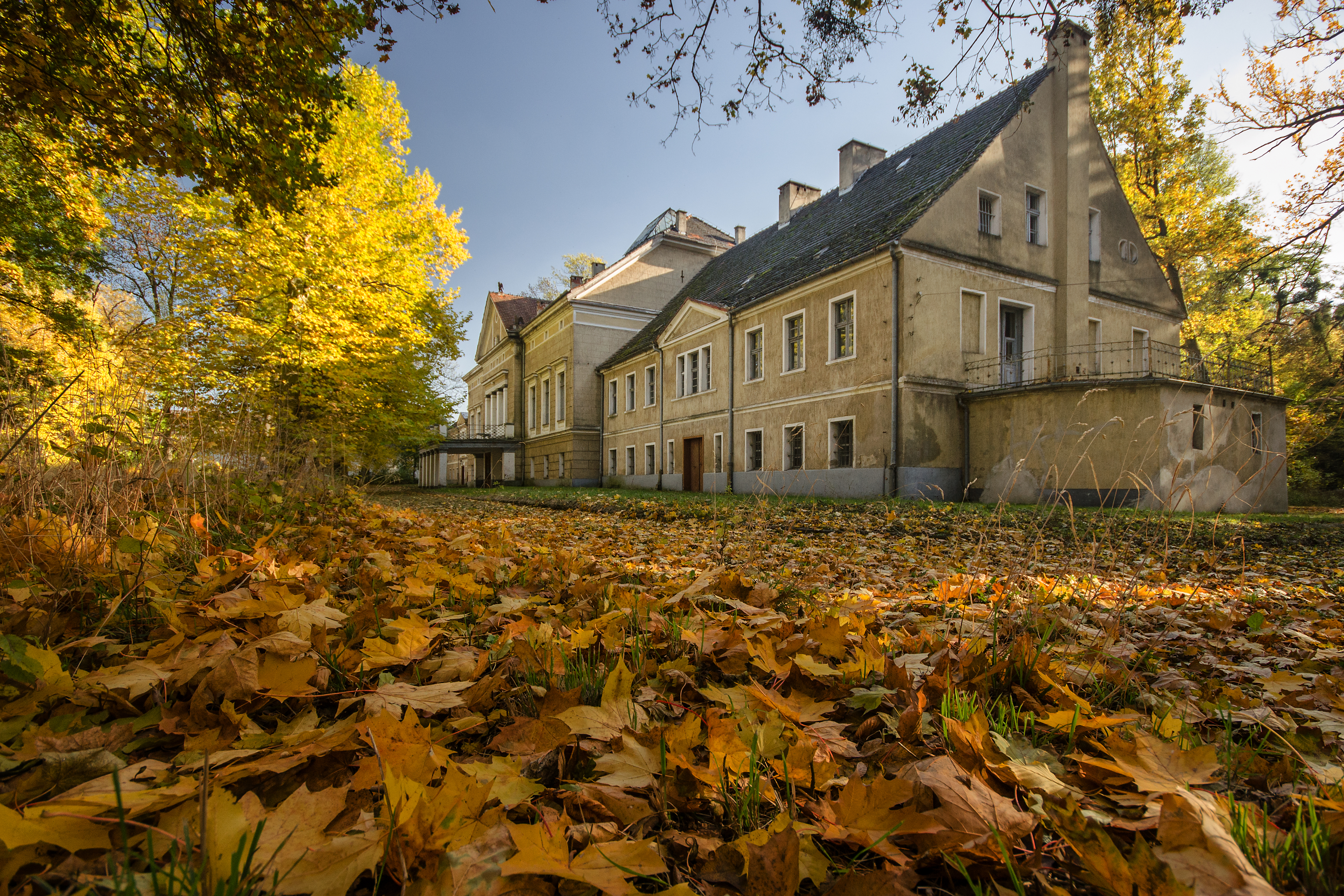 Bąków, pałac, 1 poł. XIX